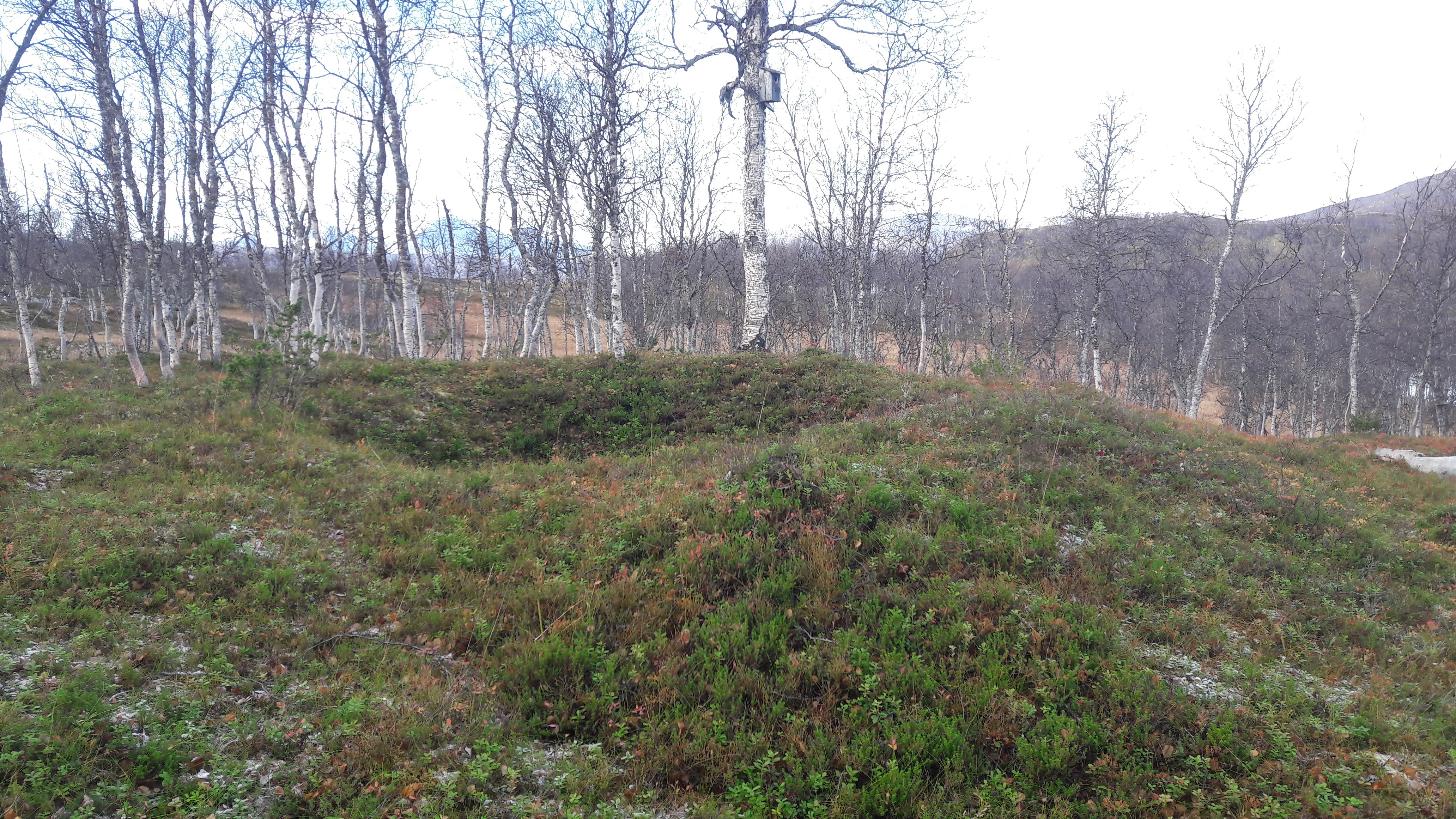 Jernvinnegrop ved Rognlivatnet.jpg.